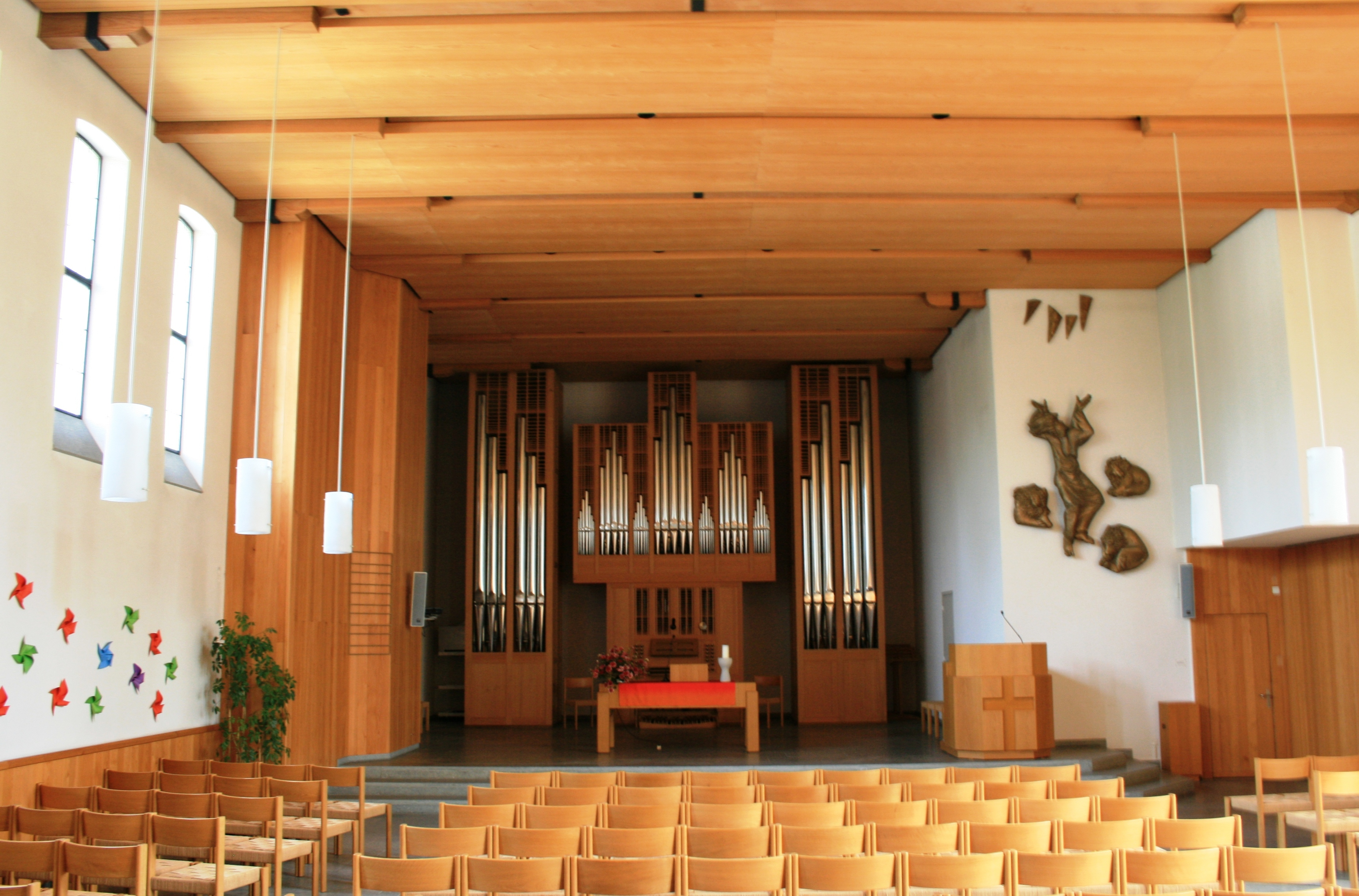 Innenraum der reformierten Kirche Wettingen, Schweiz